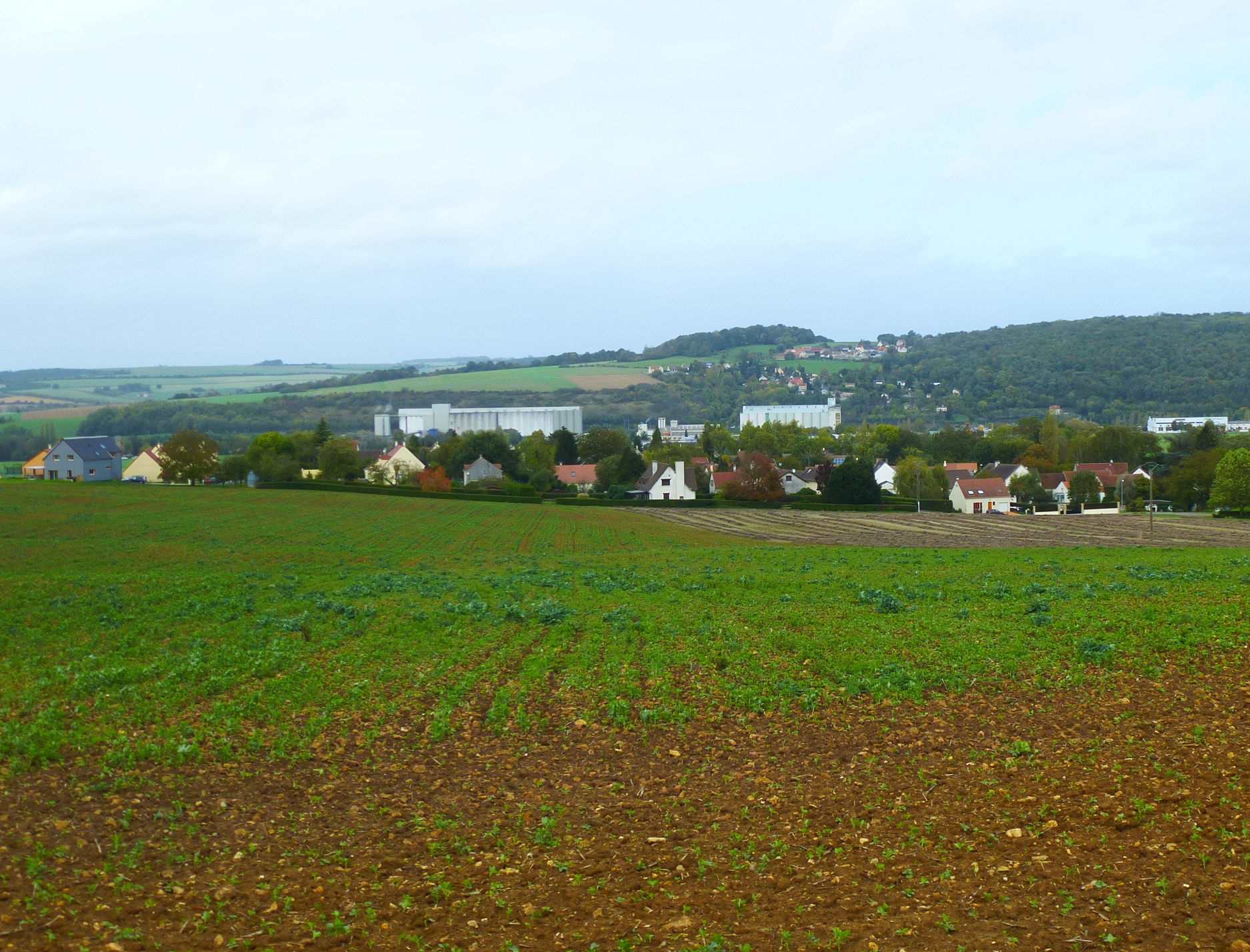 Village de Sept-Sorts En arrière plan, silos le long de la Marne et au-delà le hameau de Morintru. (département de la Seine-et-Marne, région Île-de-France).